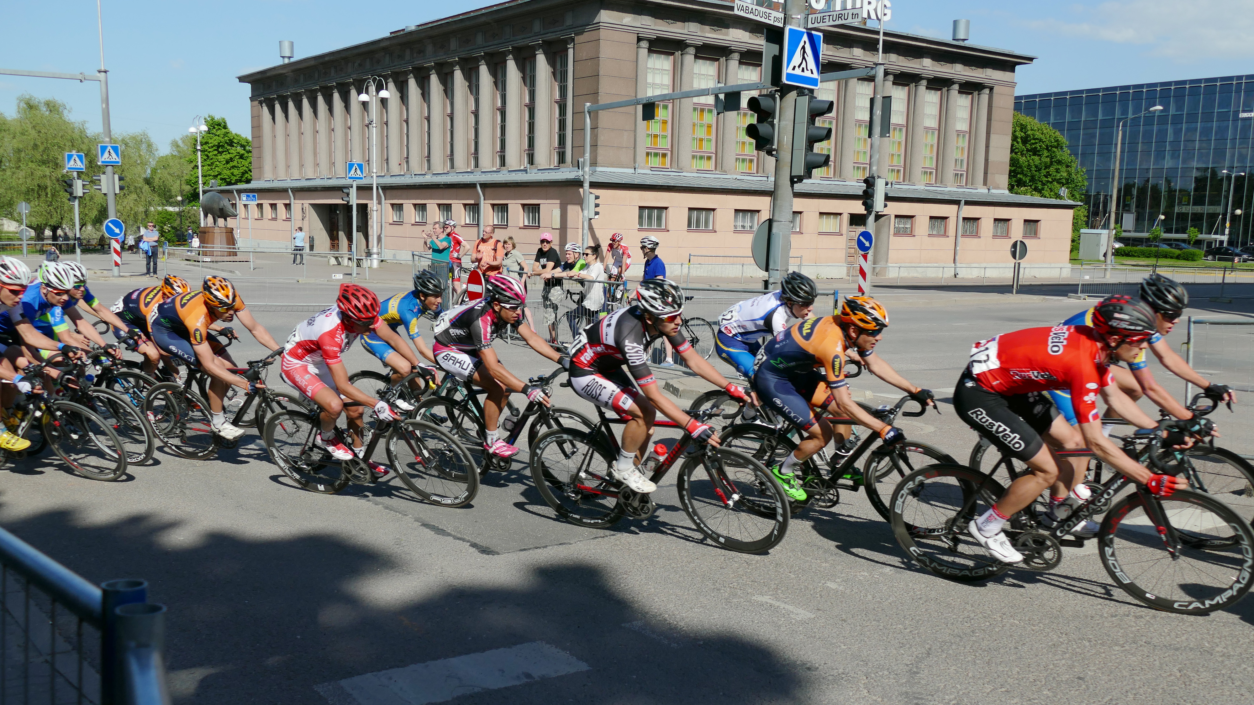 Tour of Estonia Tartu Grand Prix 2. etapp Tartu tänavatel 30.05.2015. Grupisõit 150km.